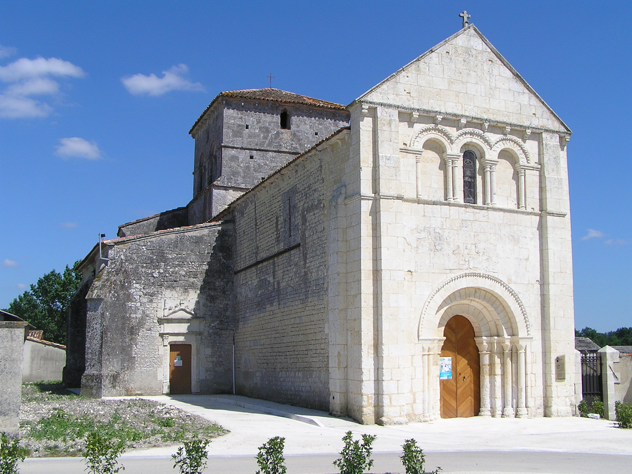 église d'Ambleville, Charente, France